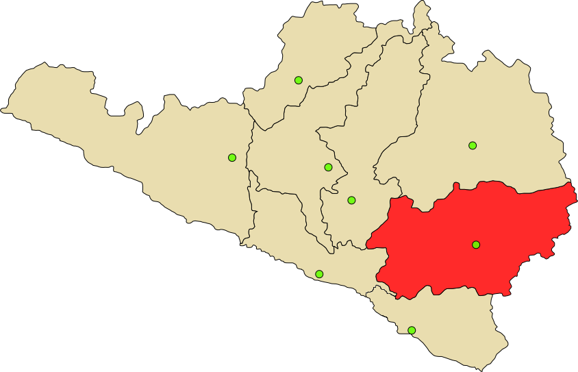 Provincias de la Región Arequipa